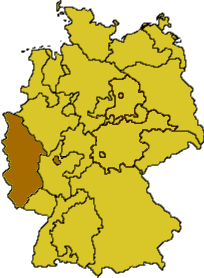 Ekd-rheinland